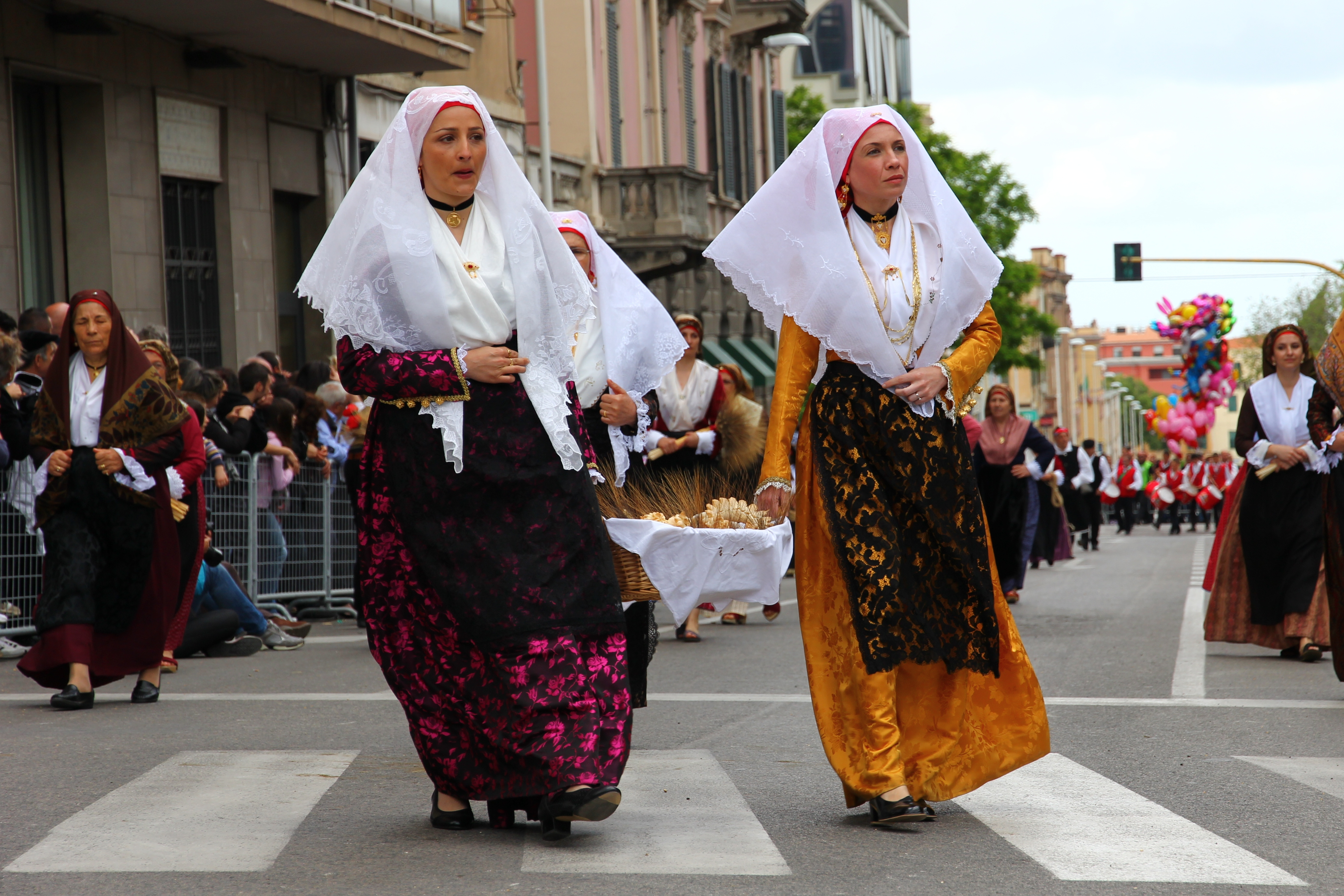 Cavalcata Sarda 2013 (Sassari)